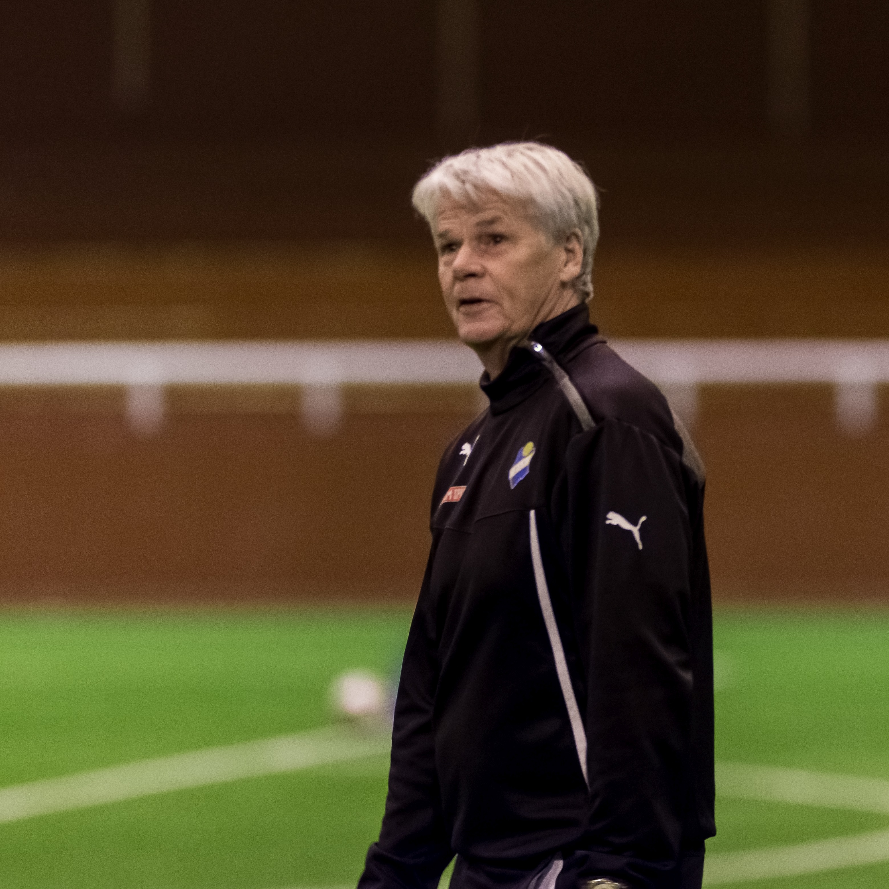 Karl-Gunnar Björklund, assisterande tränare i Östers IF 2015, i Växjö Tipshall första dagen i träning inför Division Ett Södra 2015